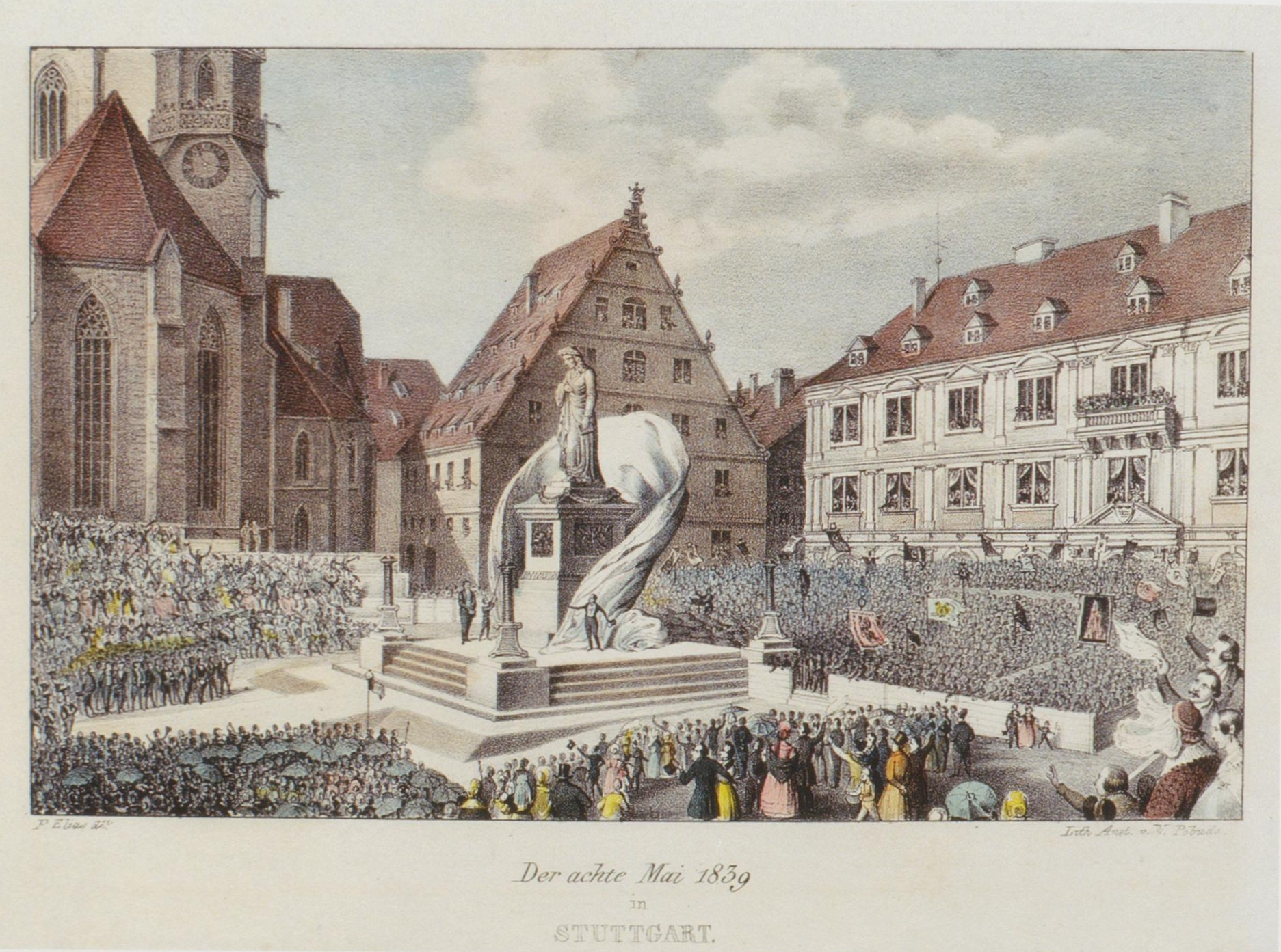 Enthüllung des Schillerdenkmals auf dem Schillerplatz in Stuttgart am 8. Mai 1839. Zeichnung: Friedrich Bernhard Elias, Lithographie: Wenzel Pobuda. Von links nach rechts: Stiftskirche, Fruchtkasten, Prinzenbau.